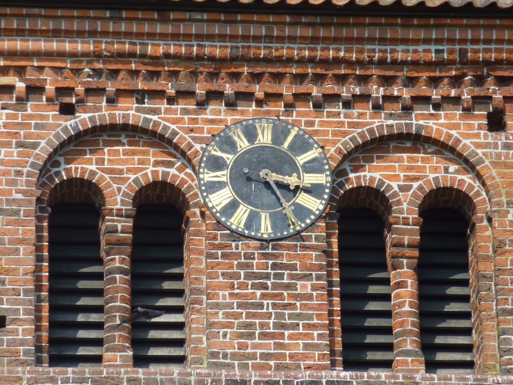 St. Johannes in Bad Zwischenahn, Detail